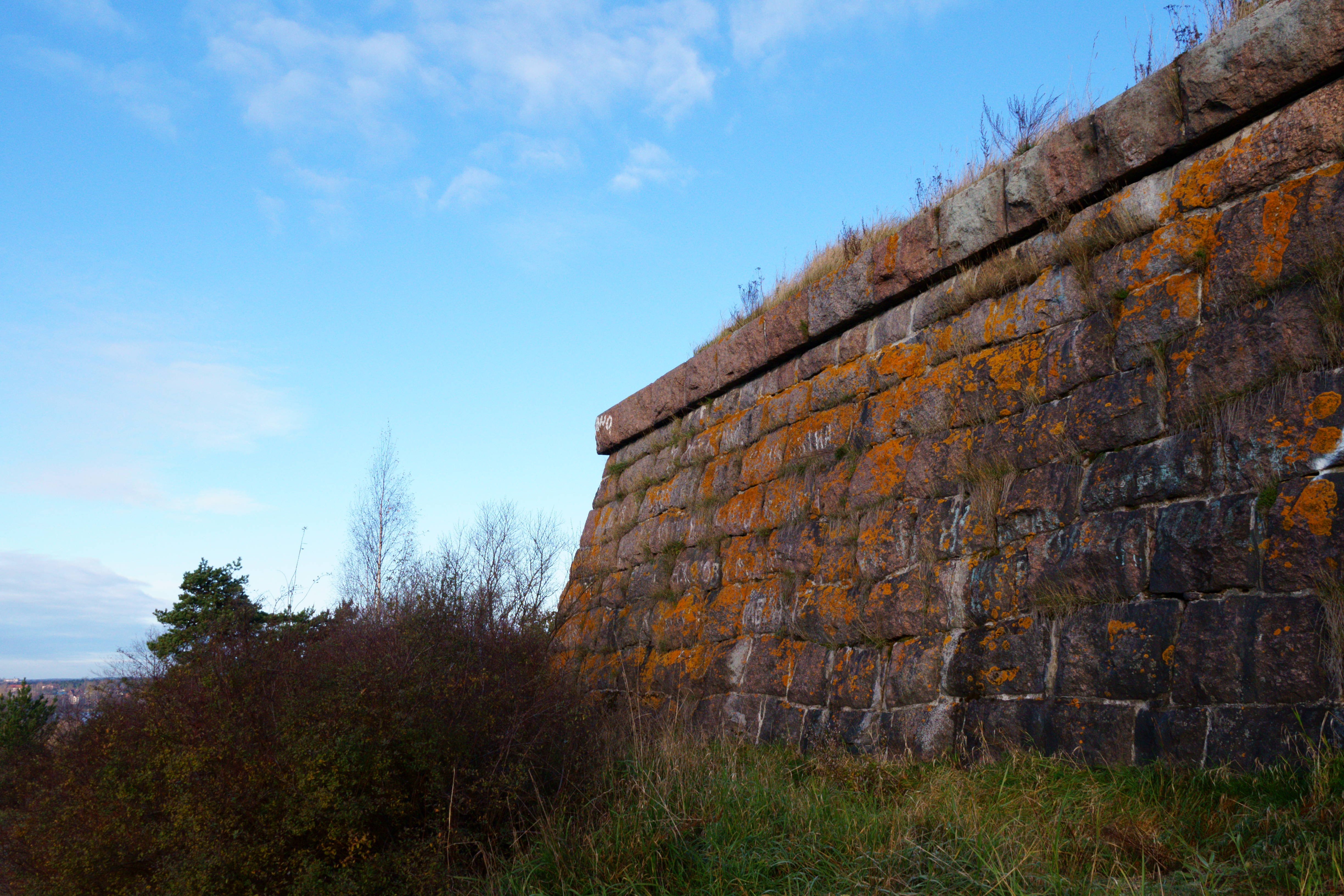 Водонапорная башня: гора Папула, парк, Выборг, Выборгский район, Ленинградская область